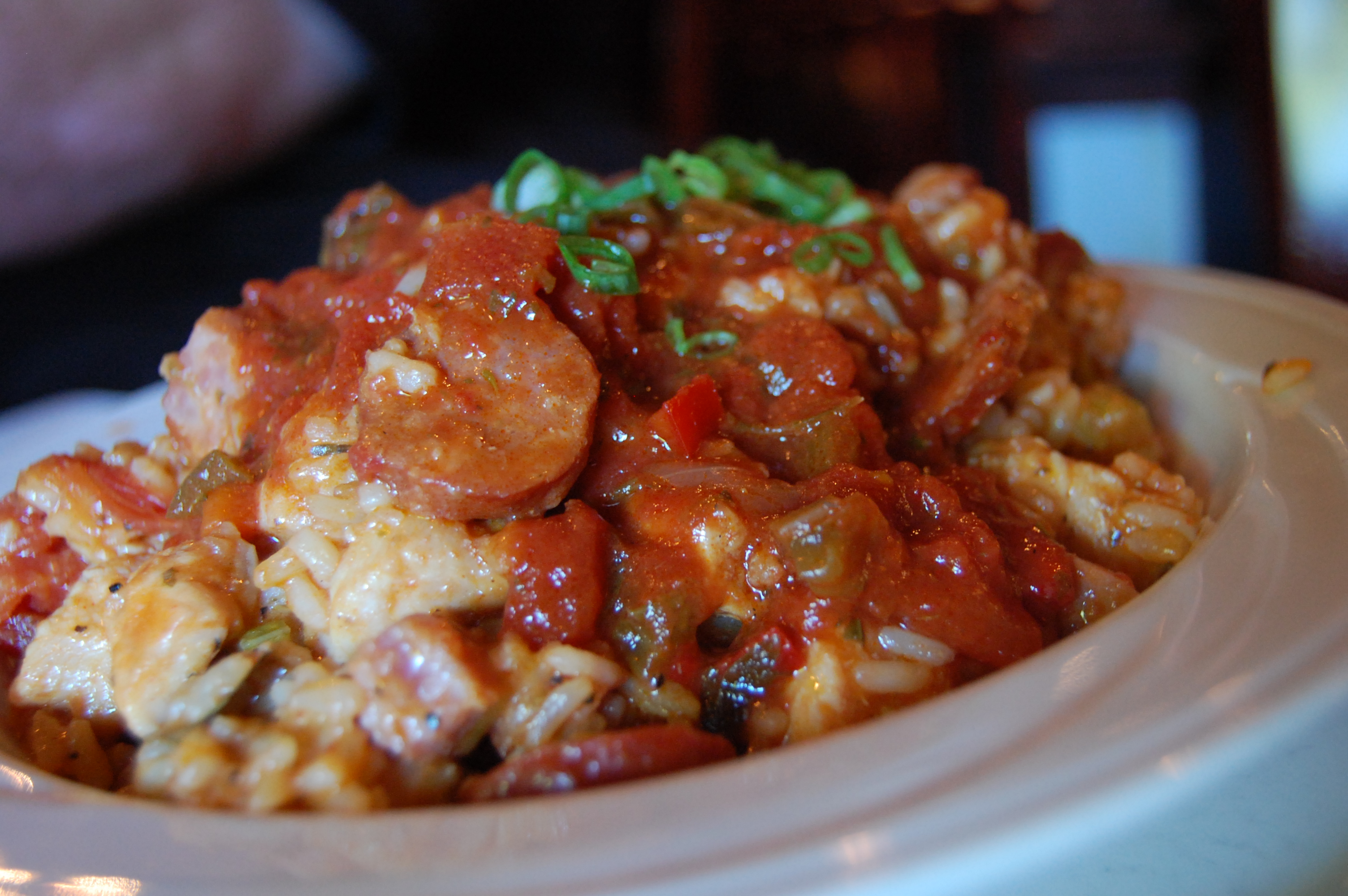 Chicken jambalaya at Russo's